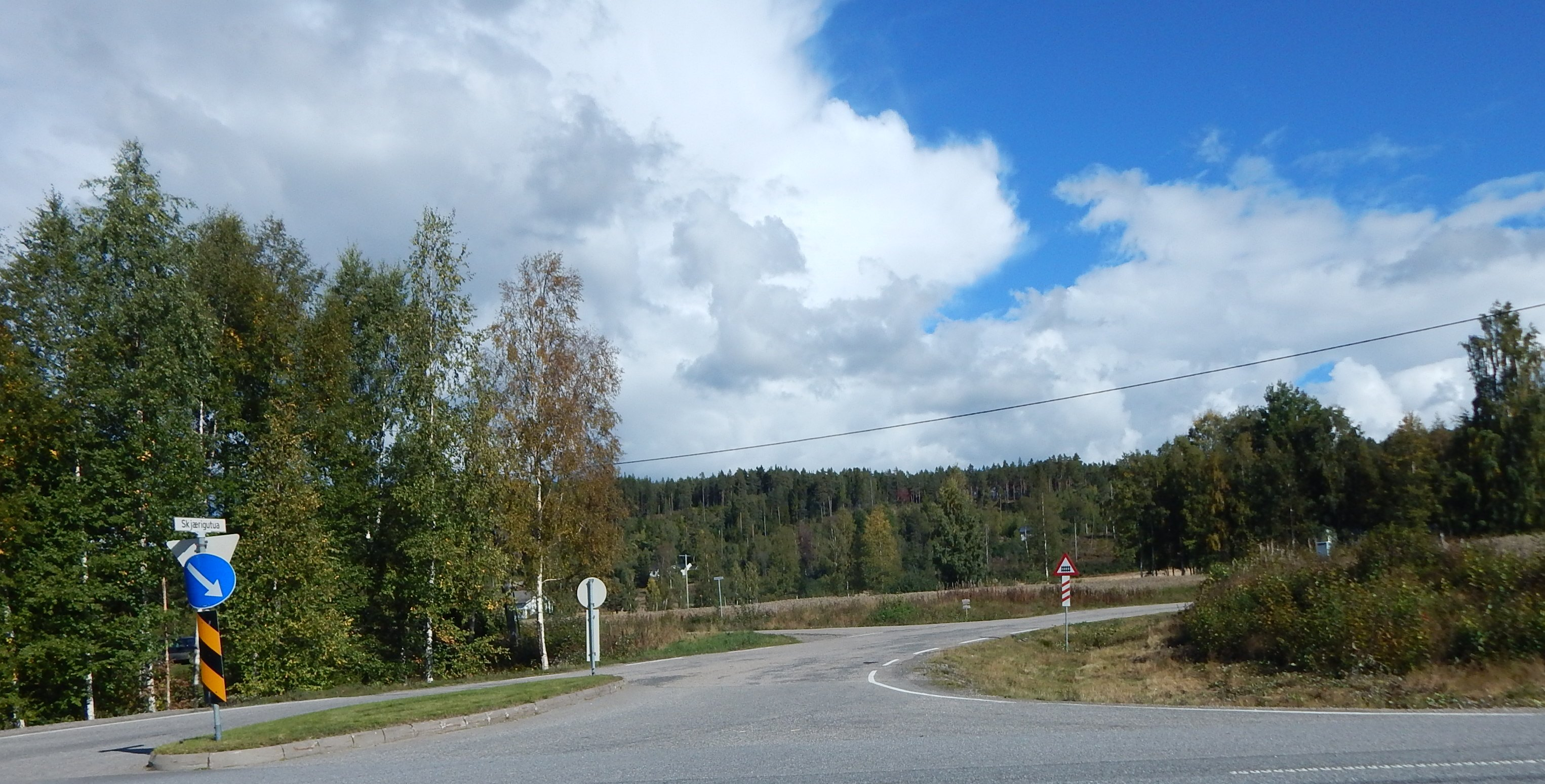 Skjærigutua (fylkesvei 439) sett fra Solørvegen (riksvei 2)